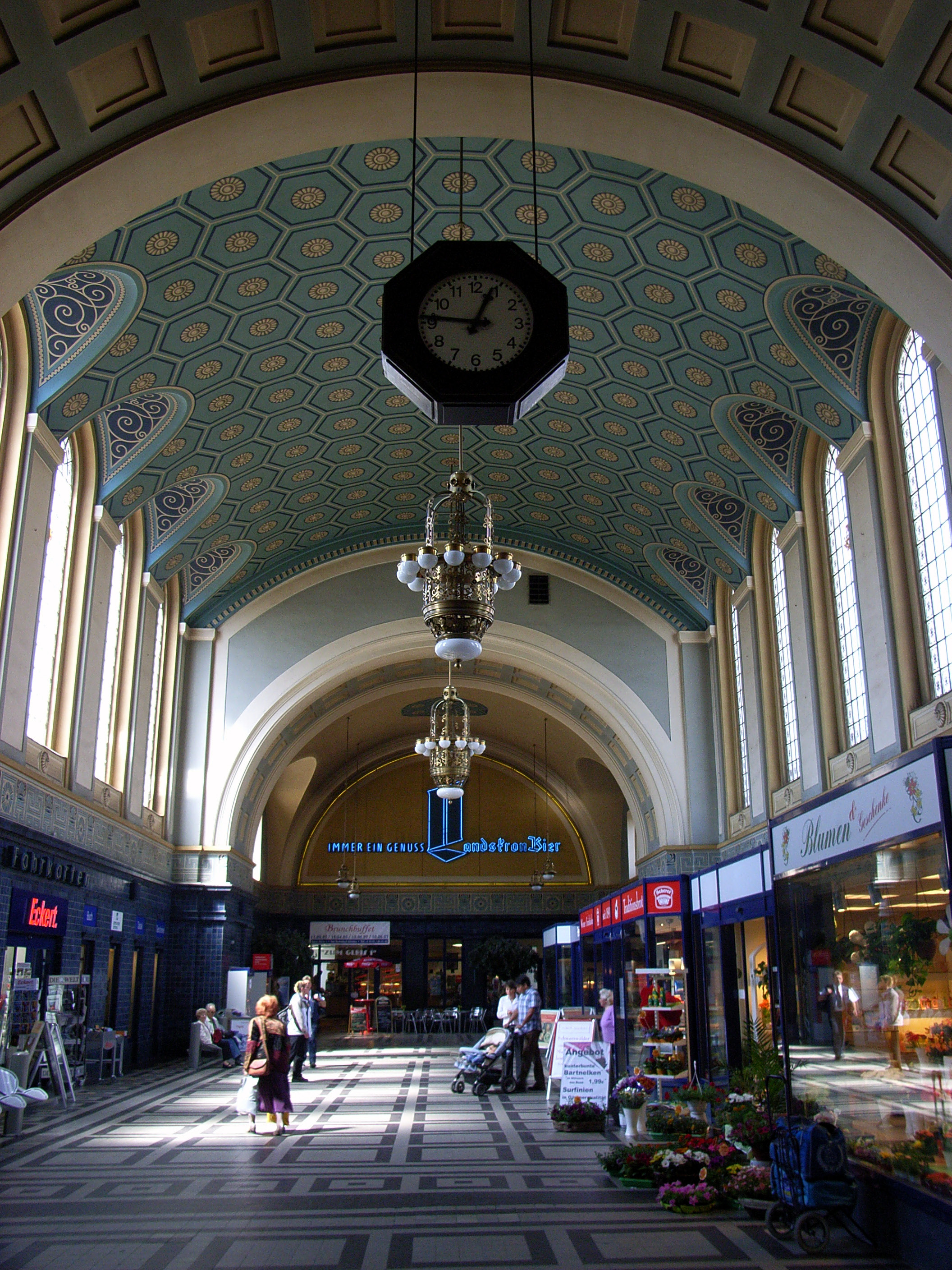 Česky: Nádražní hala v německém Görlitz